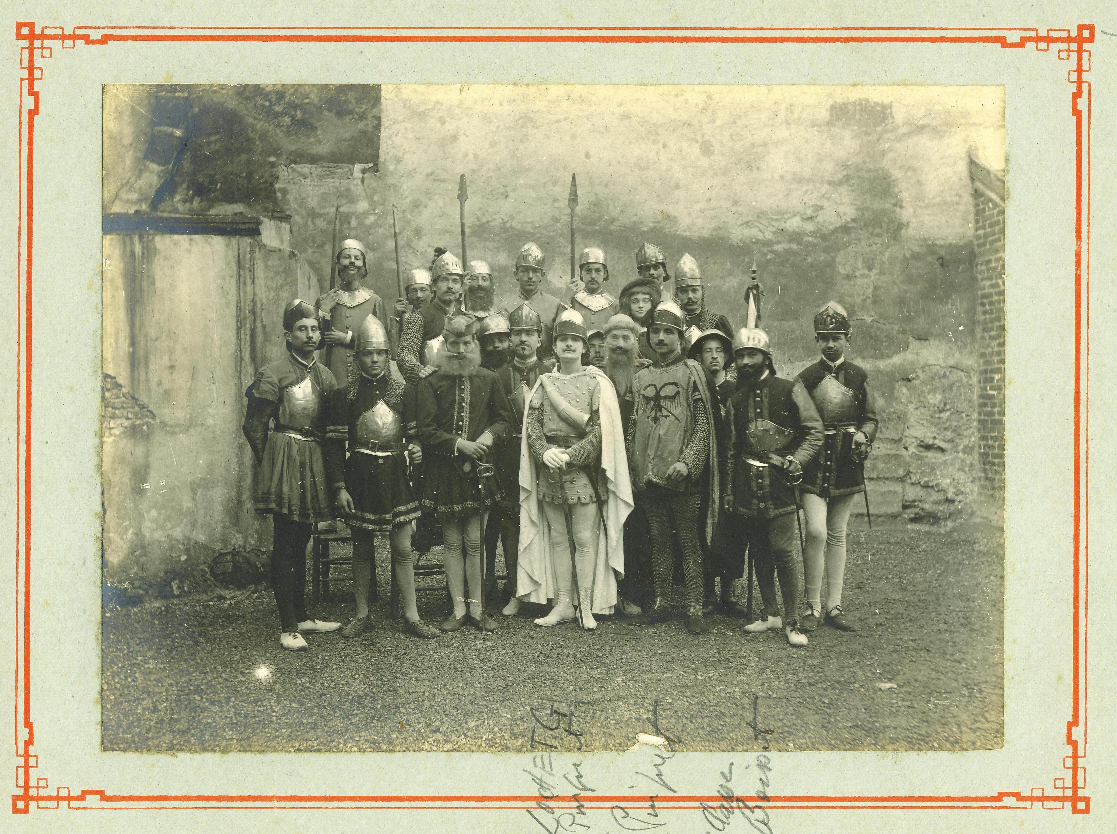 Représentation théâtrale dans un patronage paroissial en 1905.